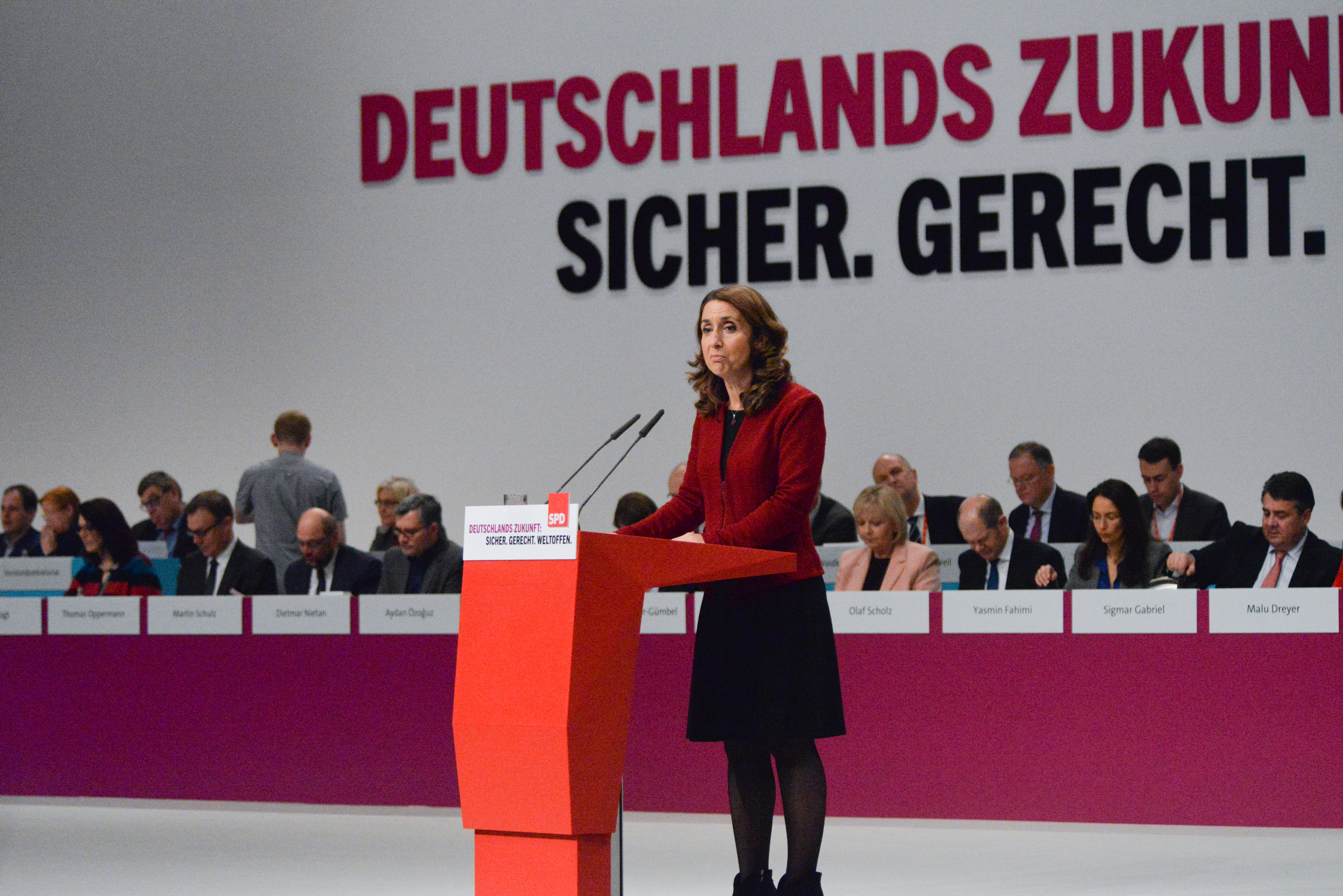 Aydan Özoğuz in 2015 auf dem SPD Bundesparteitag Berlin, 10.-12. Dezember 2015, CityCube, Messe Berlin